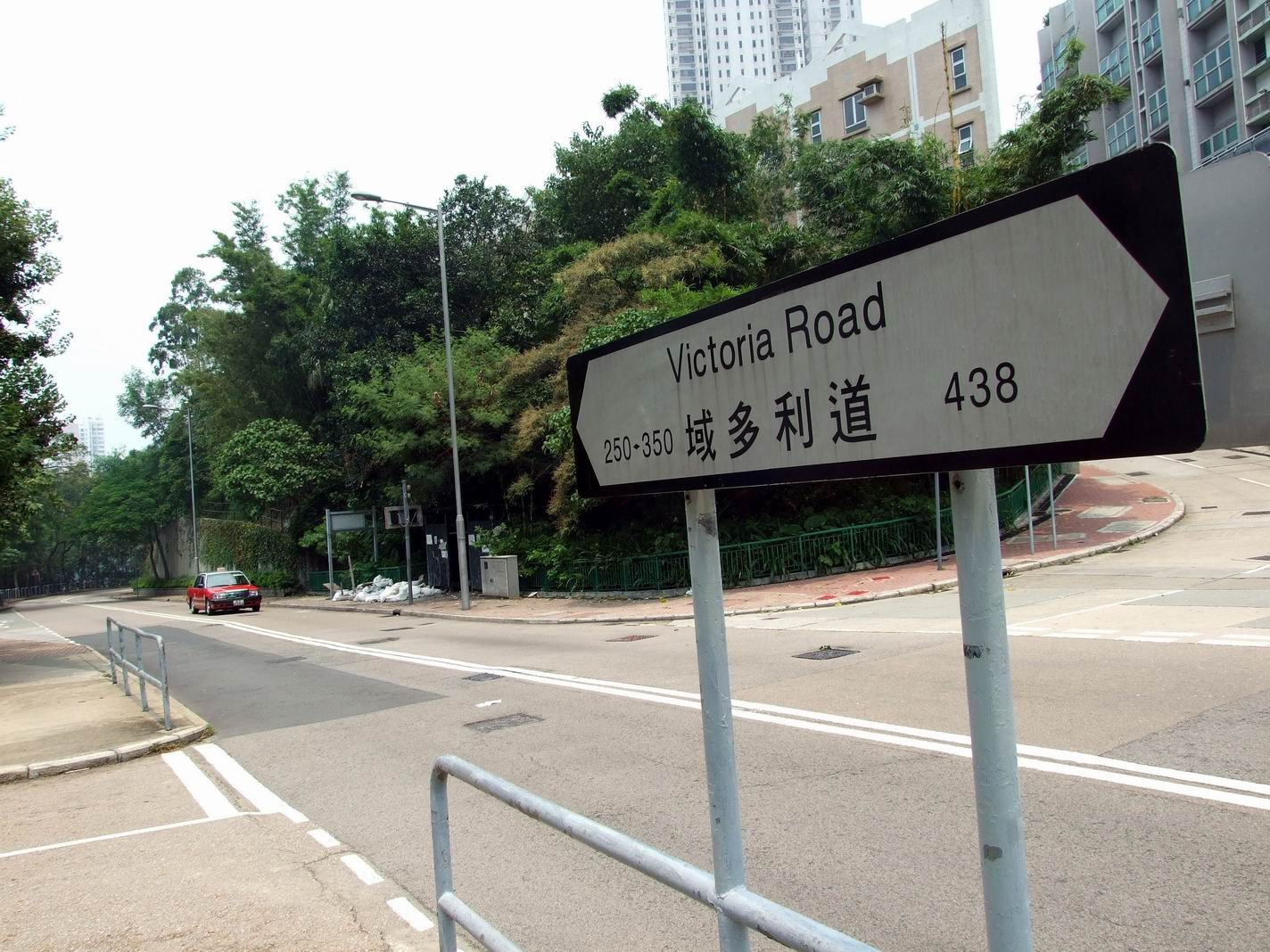 域多利道，近沙宣道